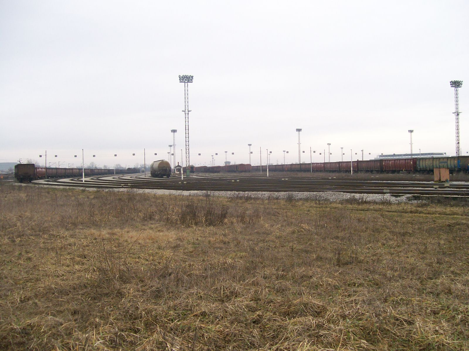 Ranžirni kolodvor Zagreb